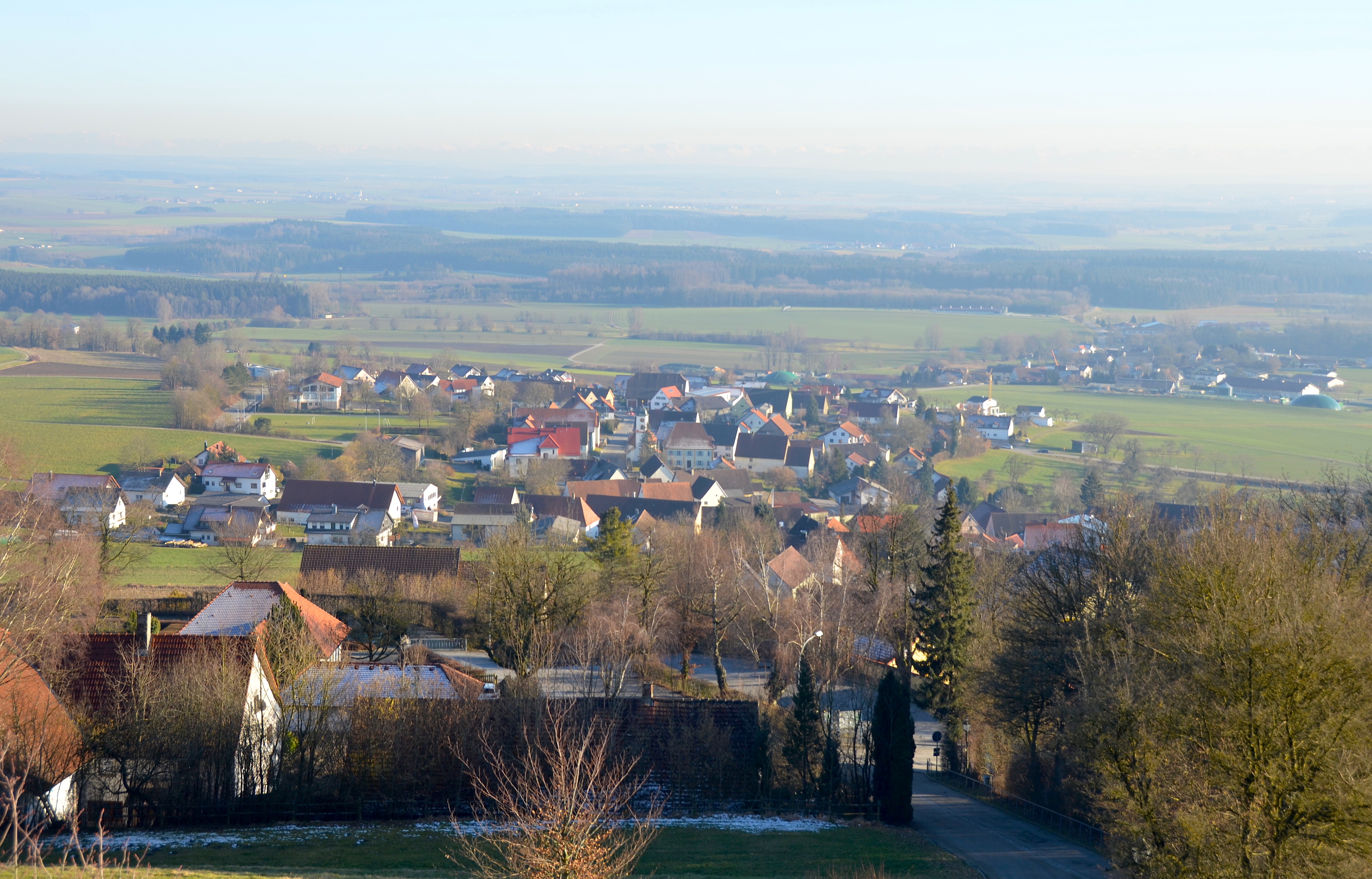 Offingen (Uttenweiler) in Baden-Württemberg, Blick vom Bussen